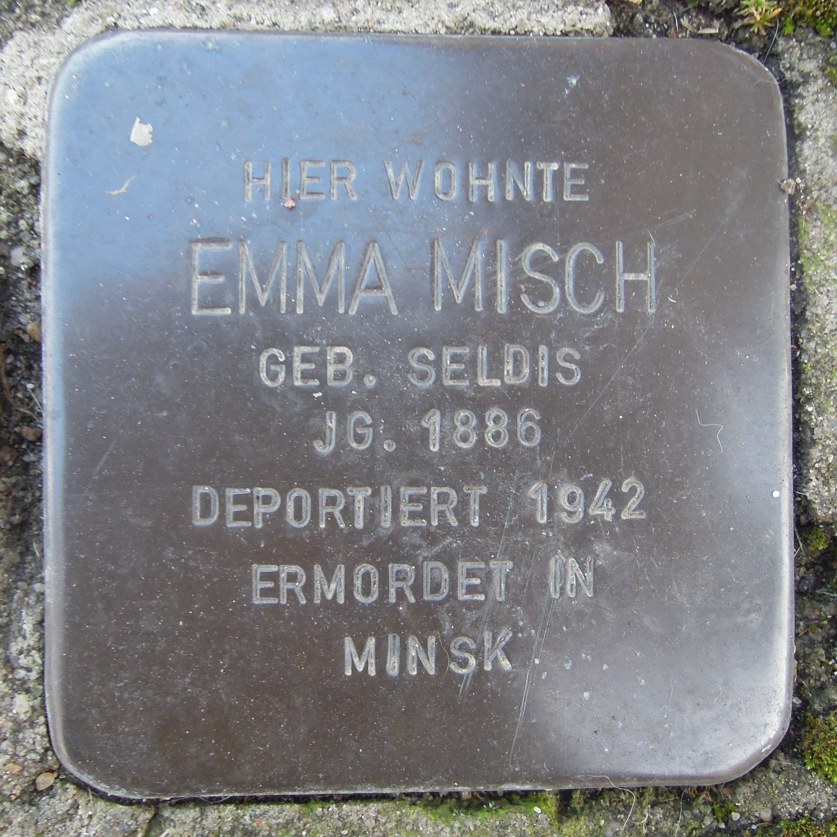 Stolperstein Alpen Bruckstraße 20 Emma Misch